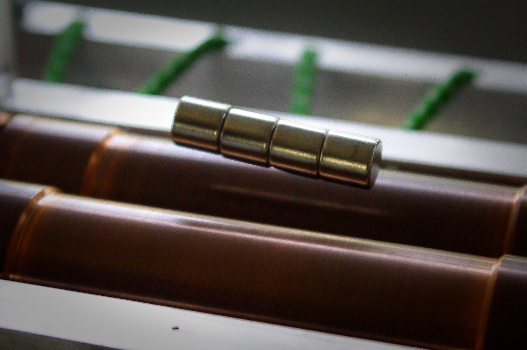 Magnet leviteerib kahe teineteise suhtes vastssuunas pöörleva vasksilindri kohal